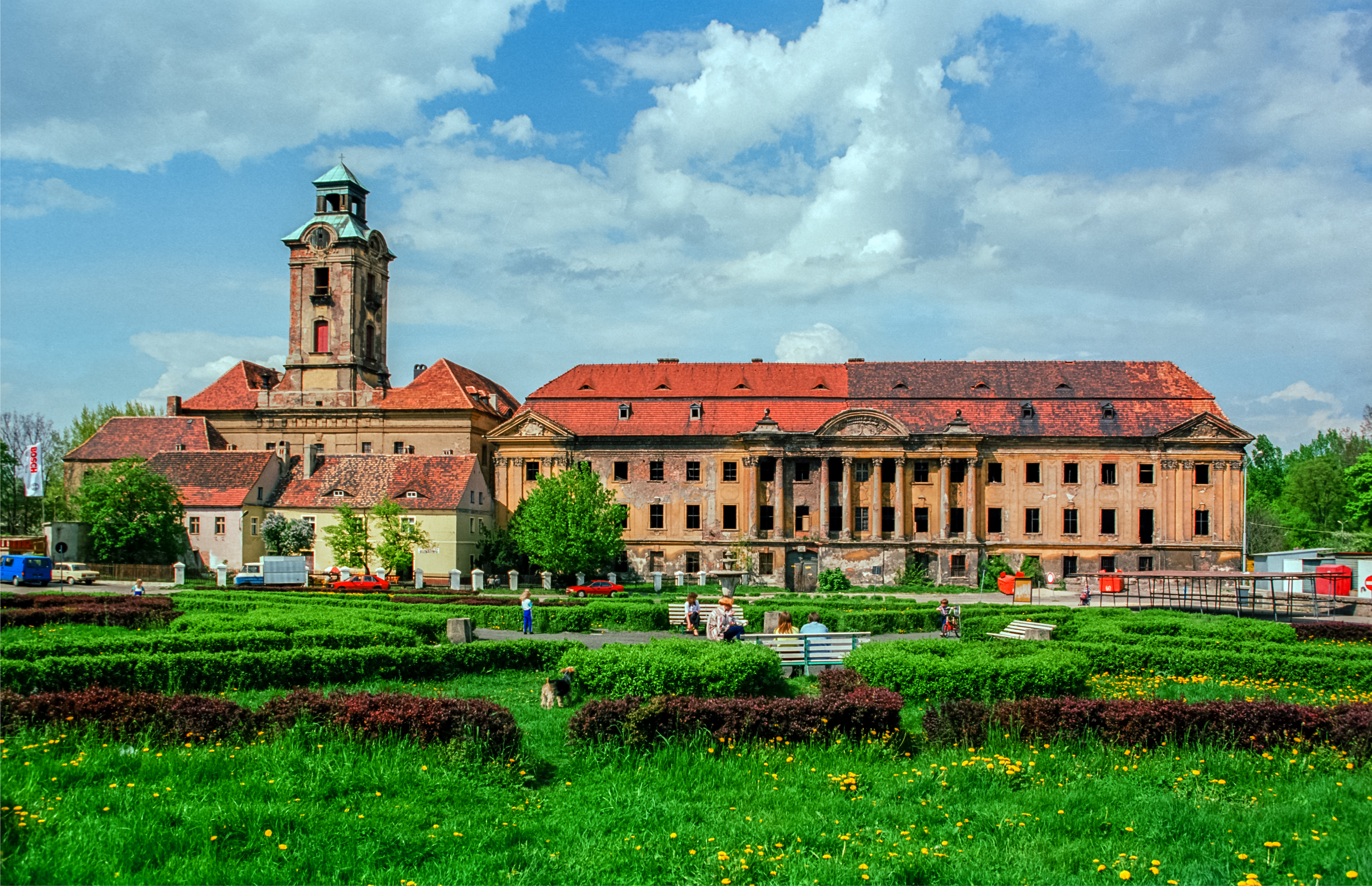 Żary - kompleks zamkowo-pałacowy, od lewej: - ruina zamku Biebersteinów - ruina barokowego pałacu Promnitzów